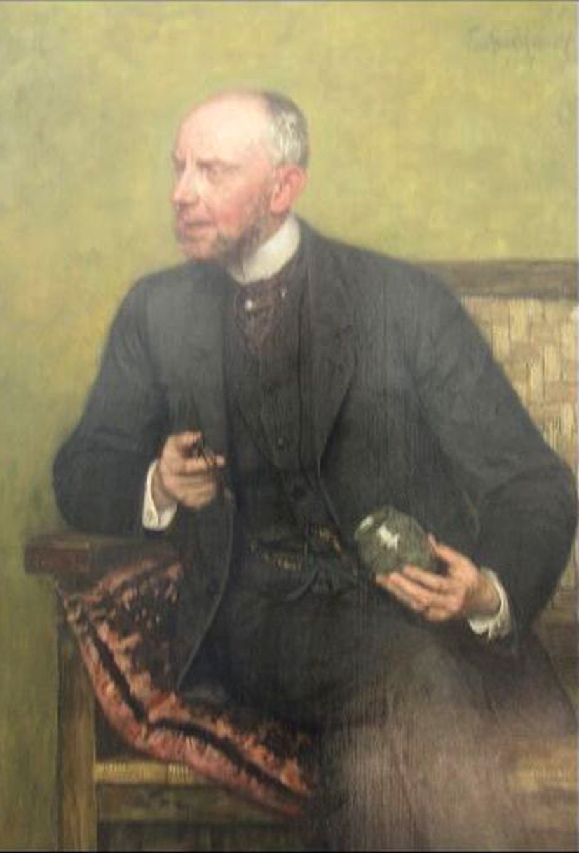 Georg Oeder, von Eduard von Gebhardt (1838-1925)